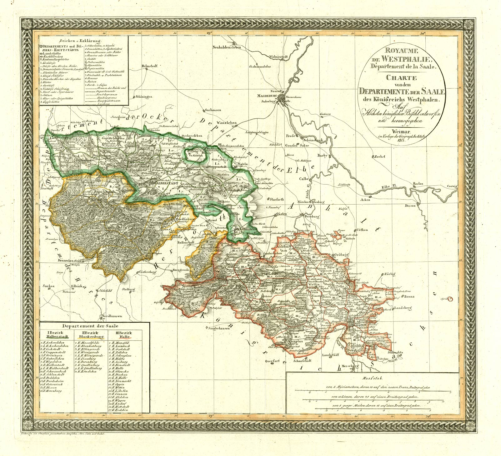 Charte von dem Departement der Saale des Königreichs Westphalen